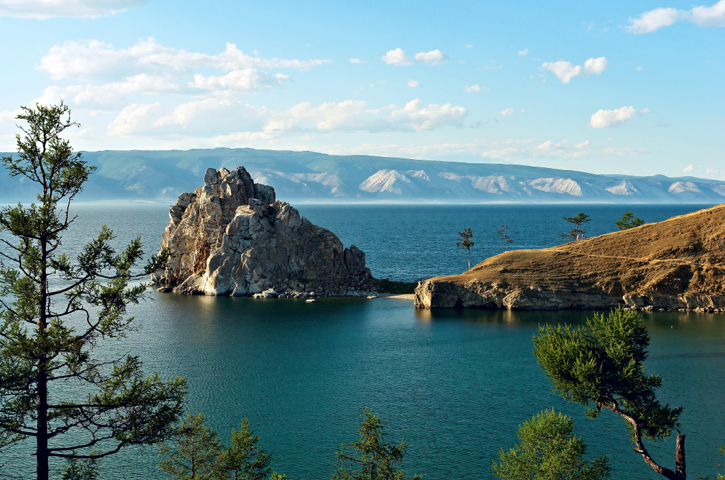 Байкал, Ольхон, Шаманка